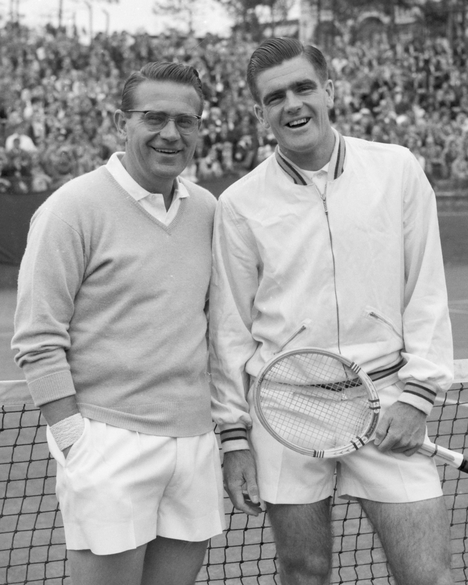 Jaroslav Drobný en Bob Mark (niet Hubert Wilton)